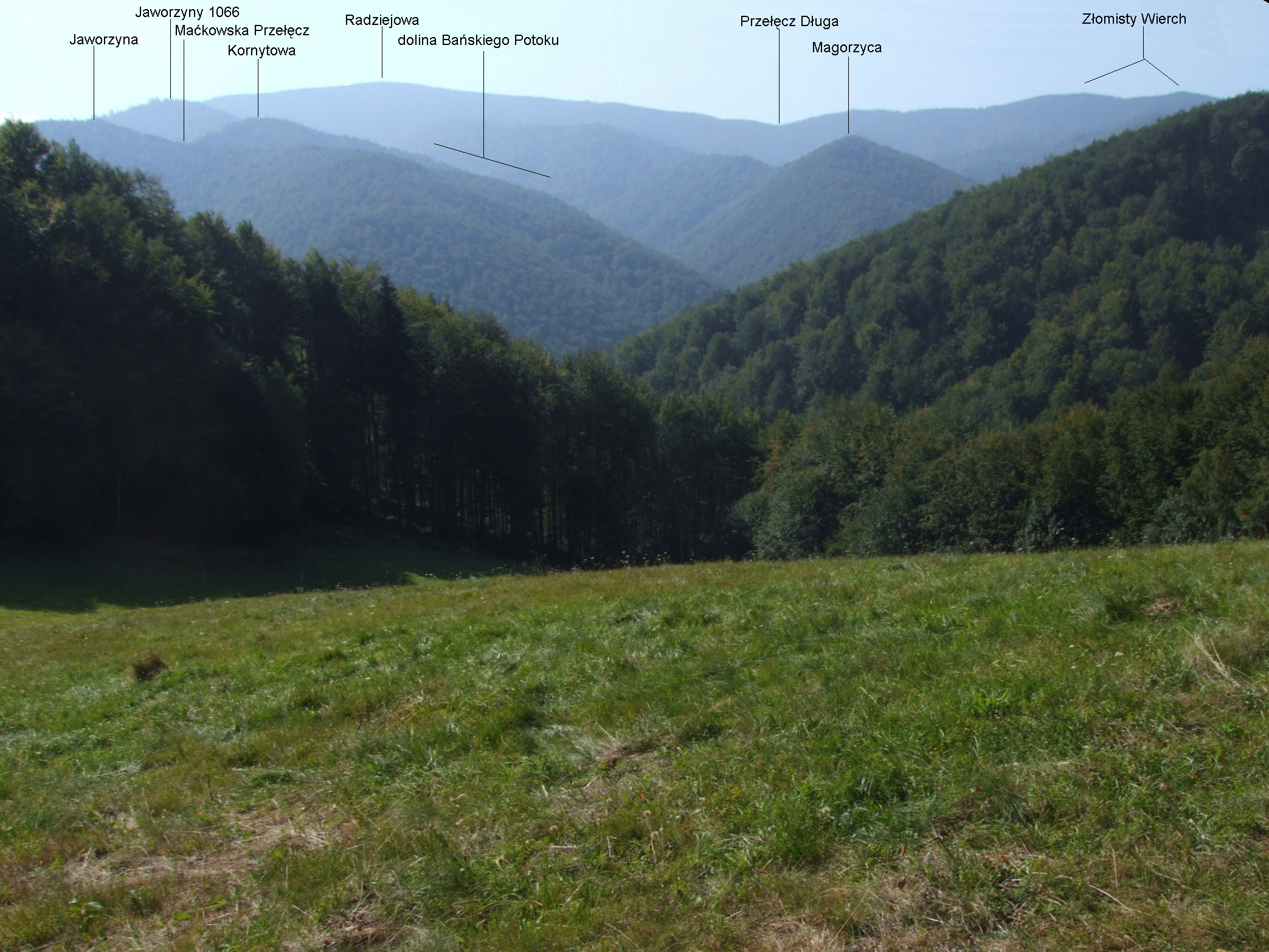 Widok z polany Kanarkówka